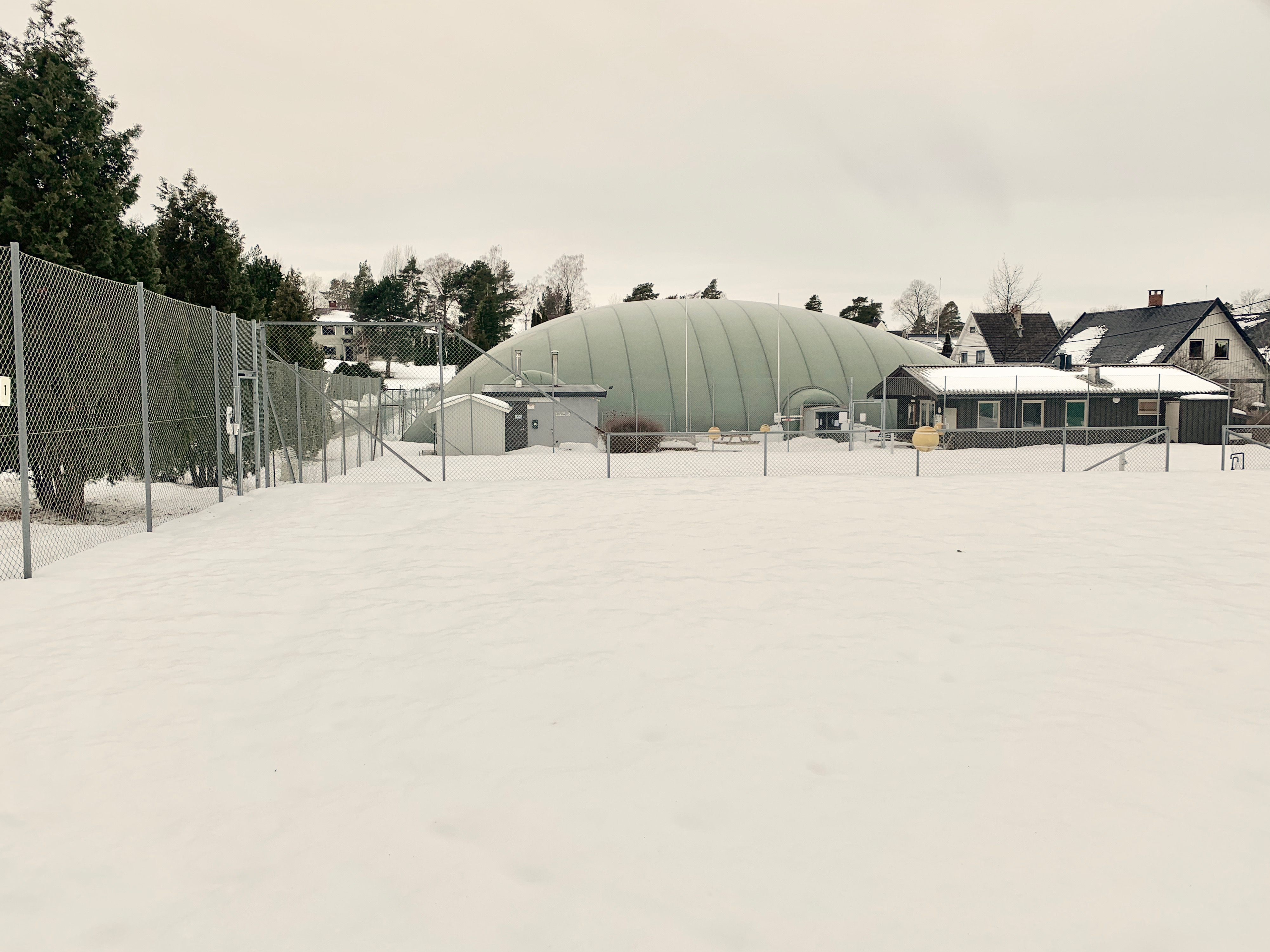 Golia Tennisklubb sitt anlegg i Oslo. I bakgrunnen innendørsanlegget kjent som « tennisbobla».